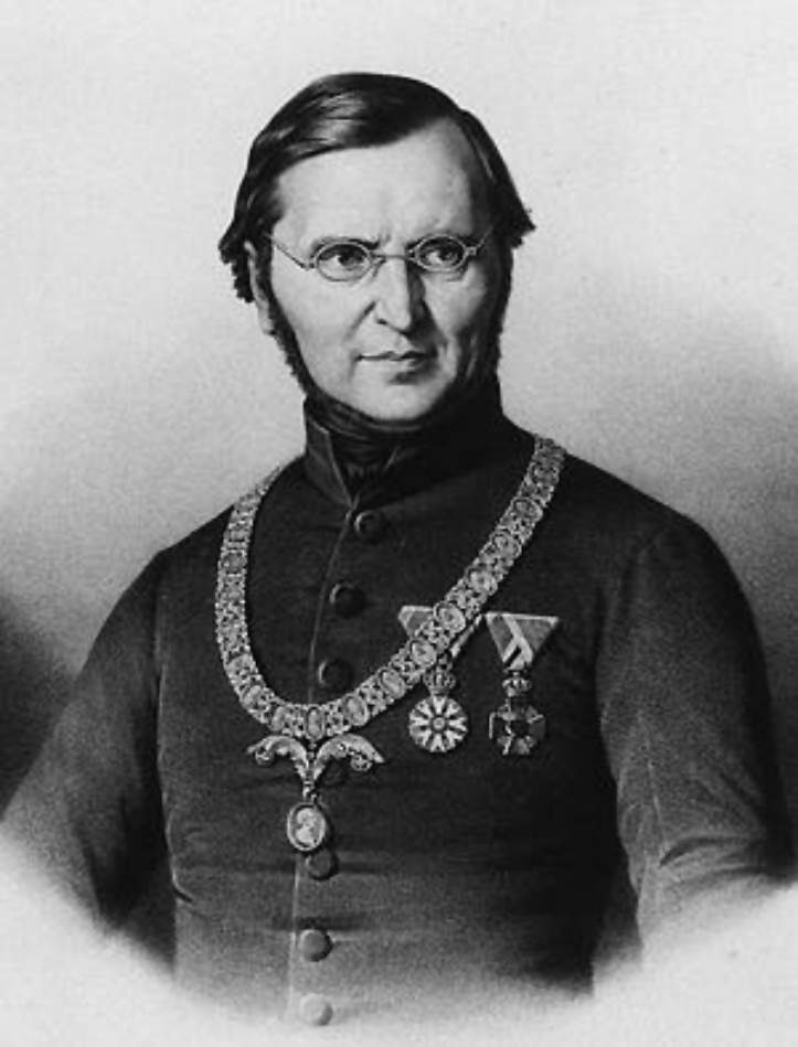 Porträt des Augsburger Oberbürgermeisters Georg von Forndran mit Amtskette